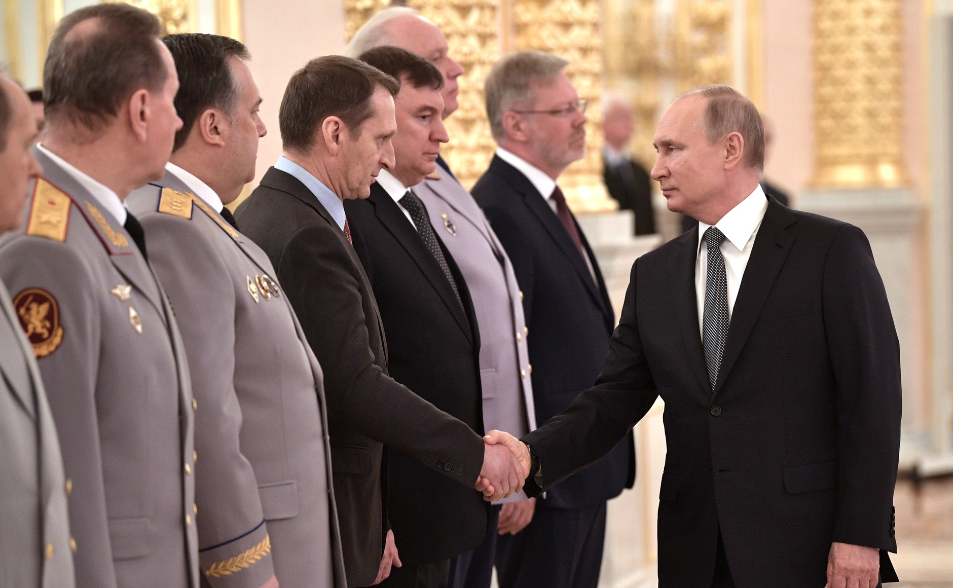 Церемония представления офицеров, назначенных на высшие командные должности.